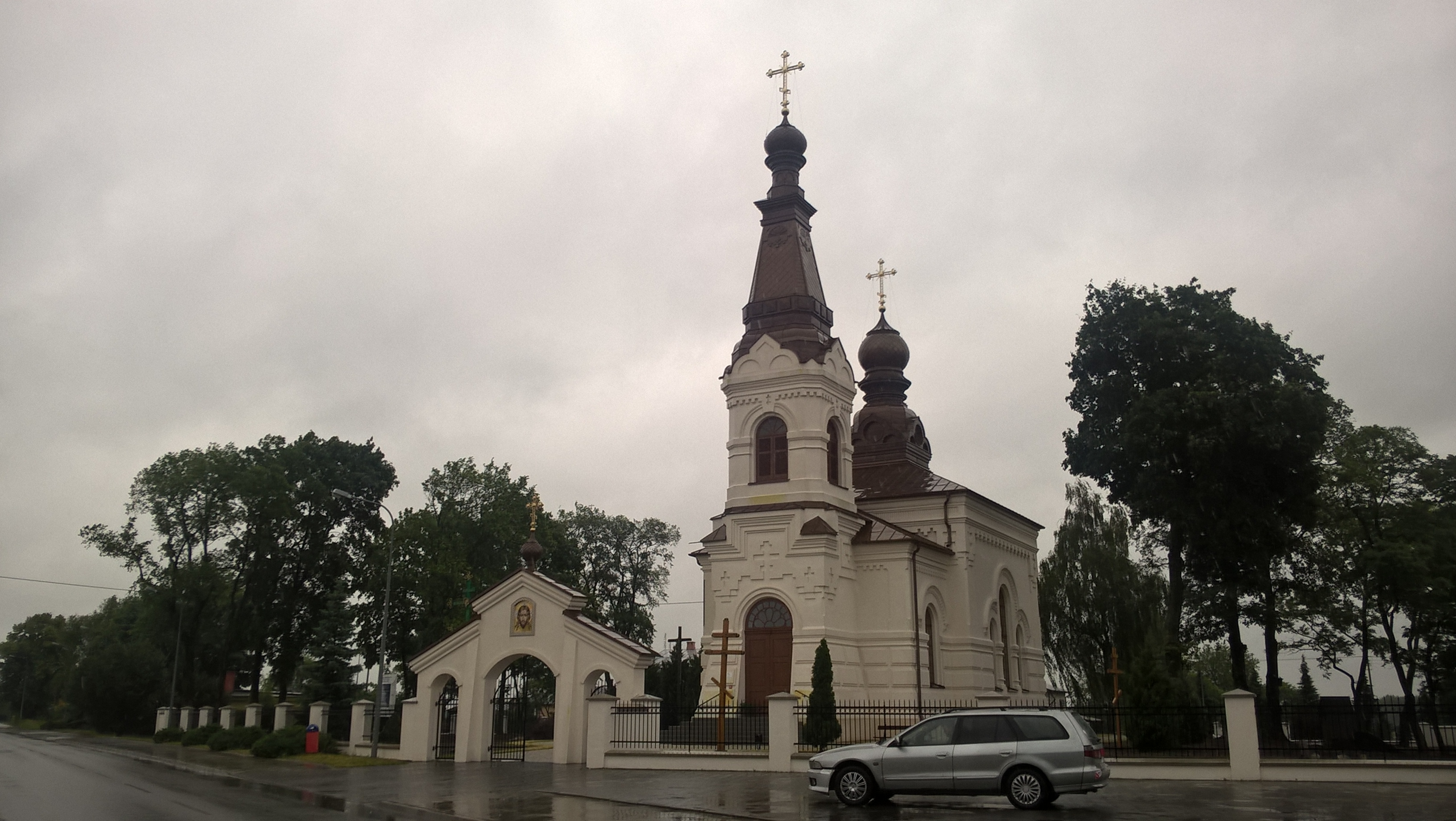 Cerkiew Opieki Matki Bożej w Kobylanach, widok po remoncie